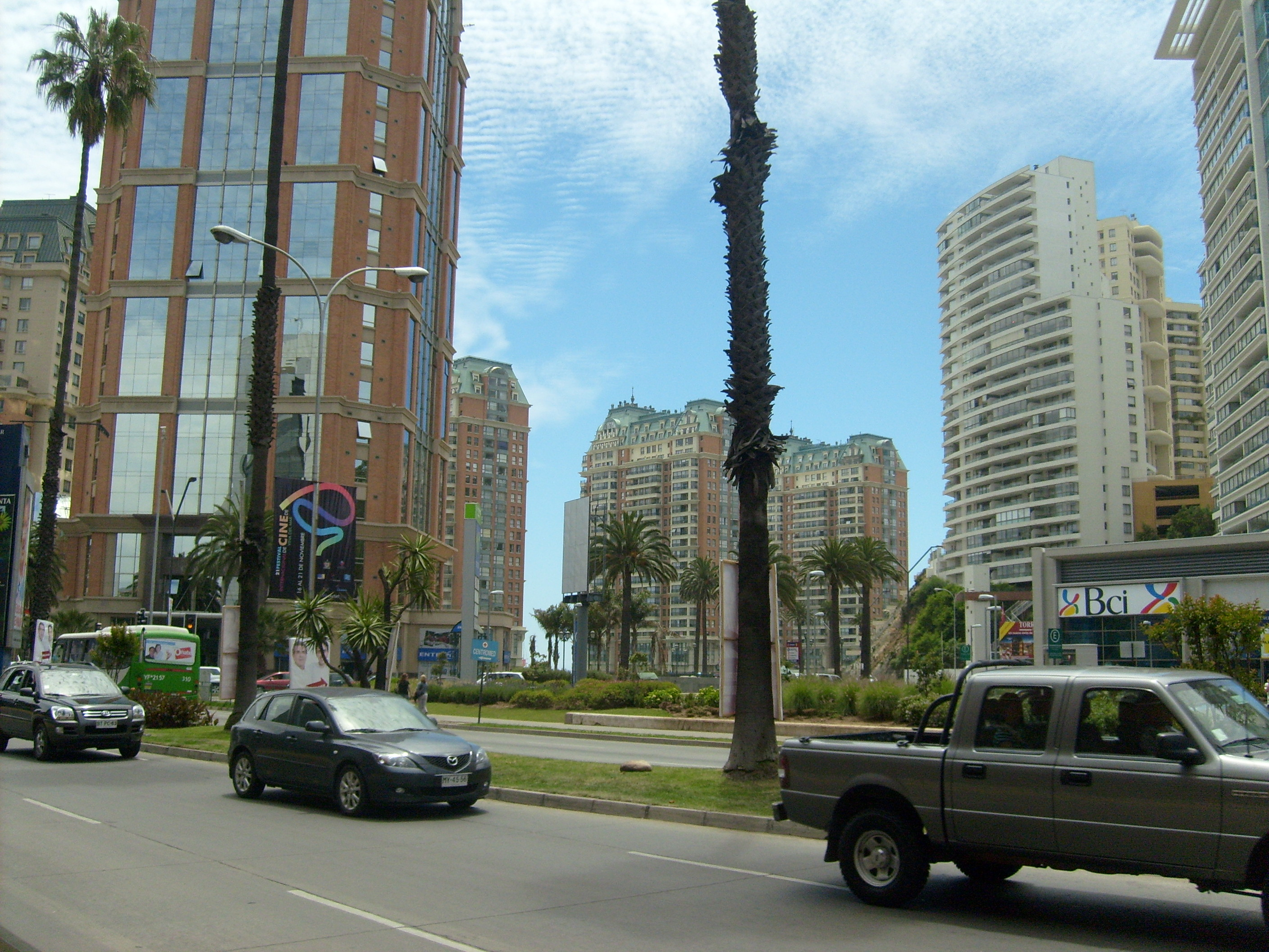 Viña del Mar, Valparaiso Region, Chile